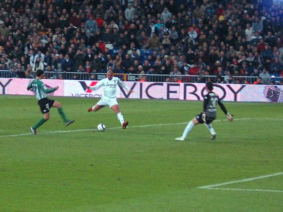 Ronaldo, do Real Madrid, marcando um gol contra o Real Bétis